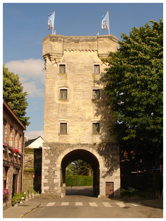 Moerenpoort, Tongeren